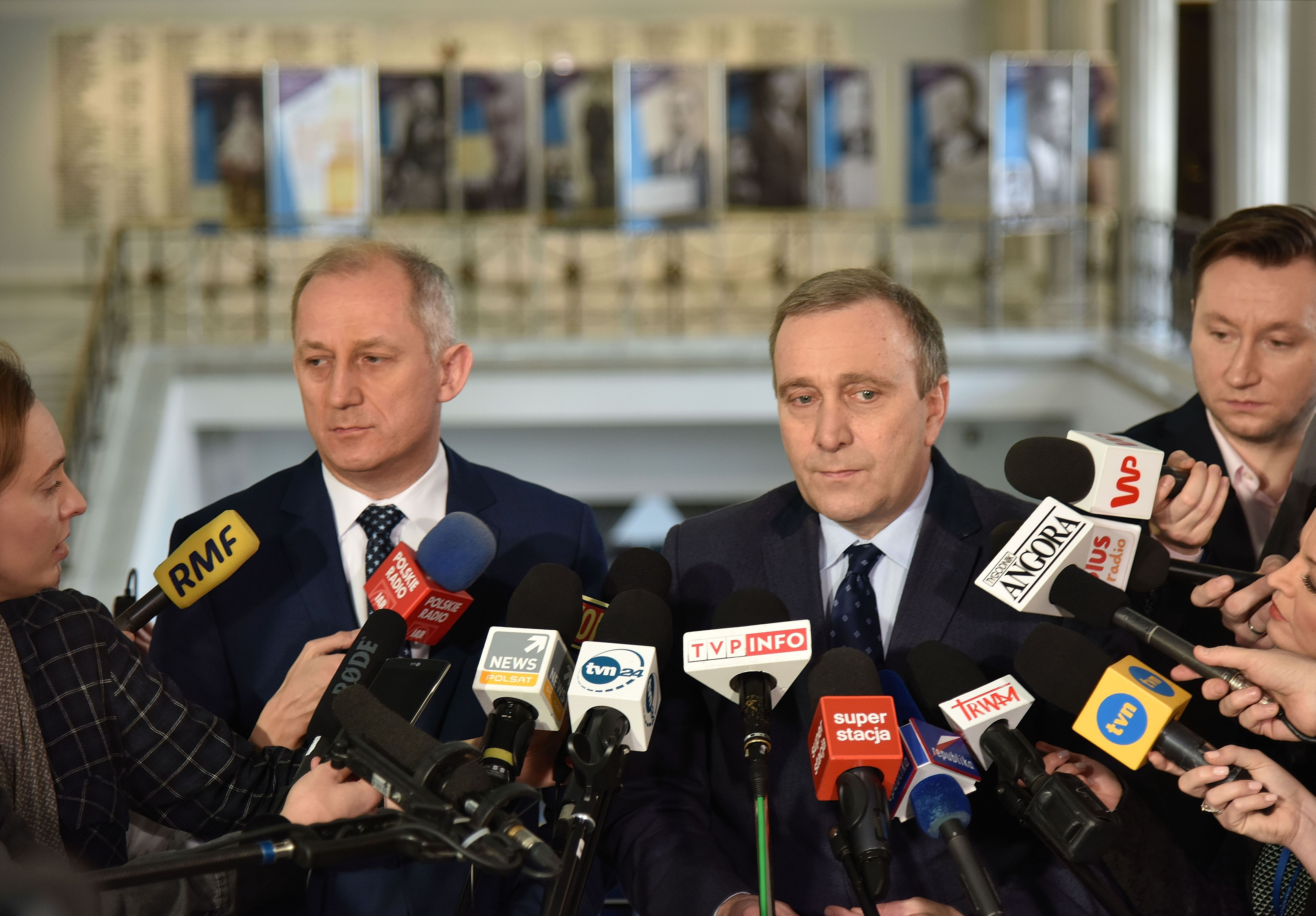 Sławomir Neumann i Grzegorz Schetyna w Sejmie RP.